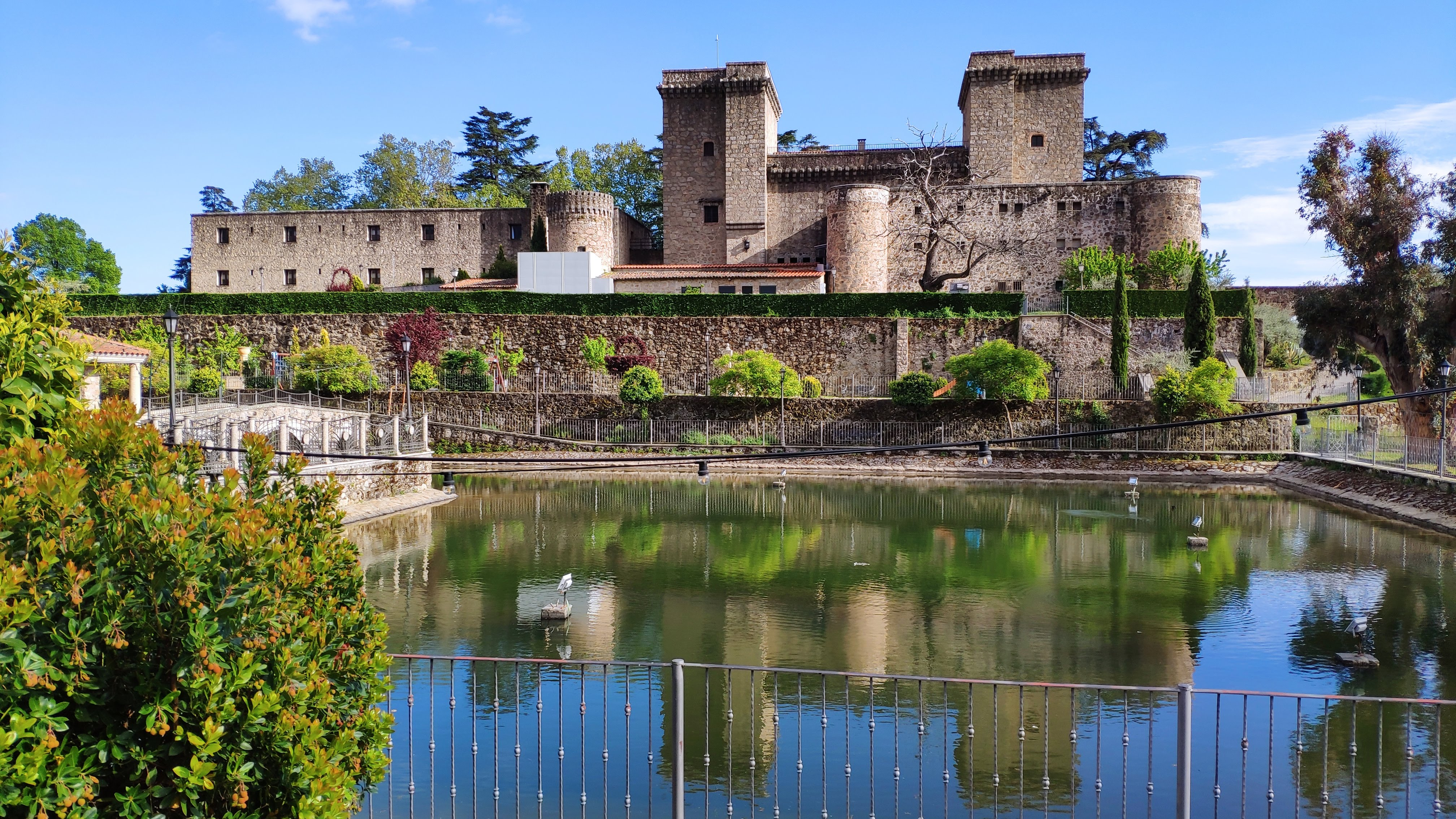 Castillo Palacio de los Condes de Oropesa en Jarandilla de la Vera, Cáceres